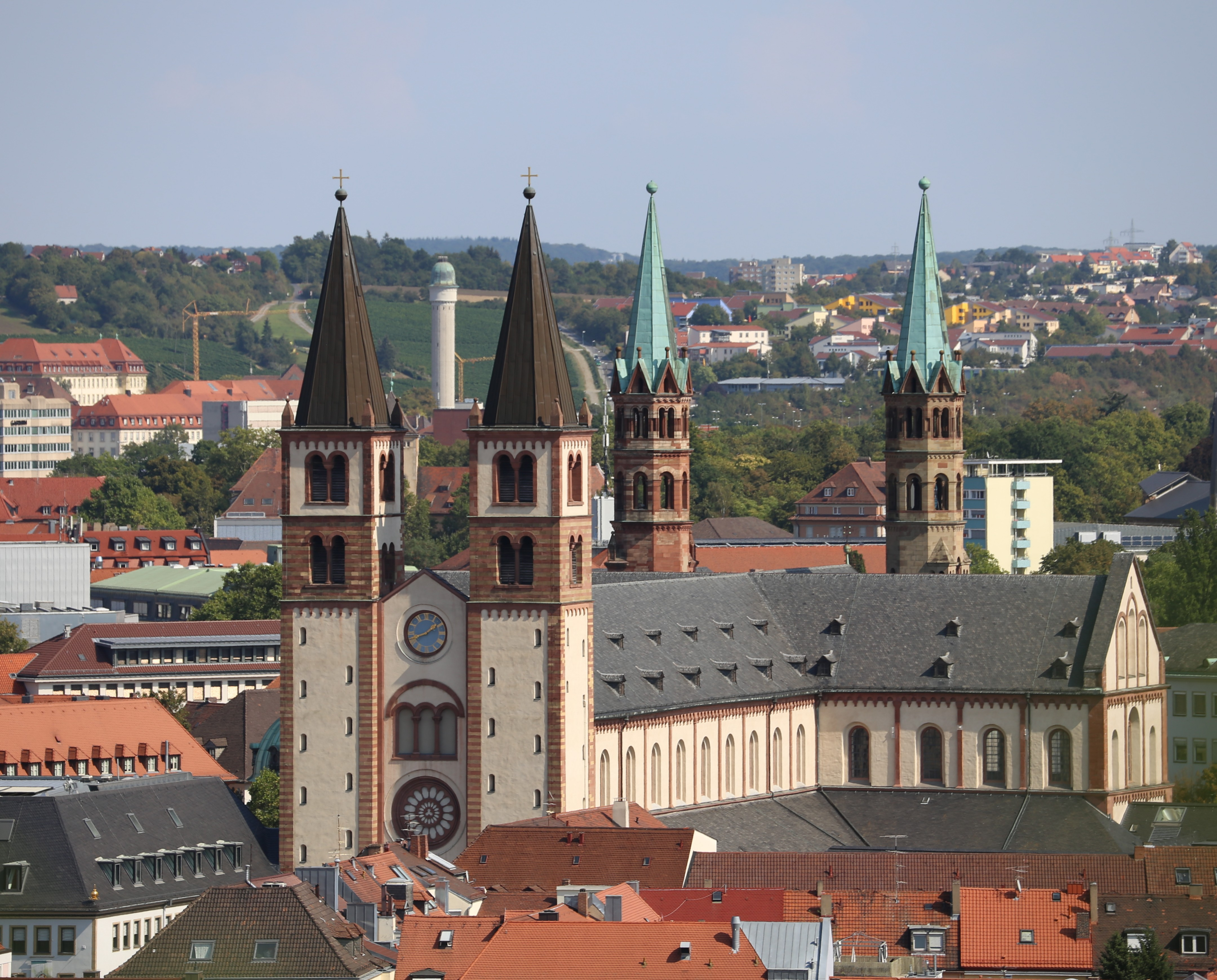 Domstraße 42; Kiliansplatz 4, Würzburg; St.-Kilians-Dom, kreuzförmige dreischiffige Pfeilerbasilika mit Westwerk und Chorflankentürmen, eingezogener Chor mit Rundapsis, Putzmauerwerk mit romanischen und neoromanischen Sandsteingliederungen, Gründung zweite Hälfte 9. Jahrhundert, Westwerk erste Hälfte 11. Jahrhundert, Neubau der Basilika zweite Hälfte 11. Jahrhundert, Erneuerung im 12. Jahrhundert, Neugestaltung der Ostteile erste Hälfte 13. Jahrhundert, Einwölbung 1608, barocke Stuckverkleidung durch Pietro Magno frühes 18. Jahrhundert, nach Kriegszerstörung vereinfachende Wiederherstellung bis 1967; mit Ausstattung